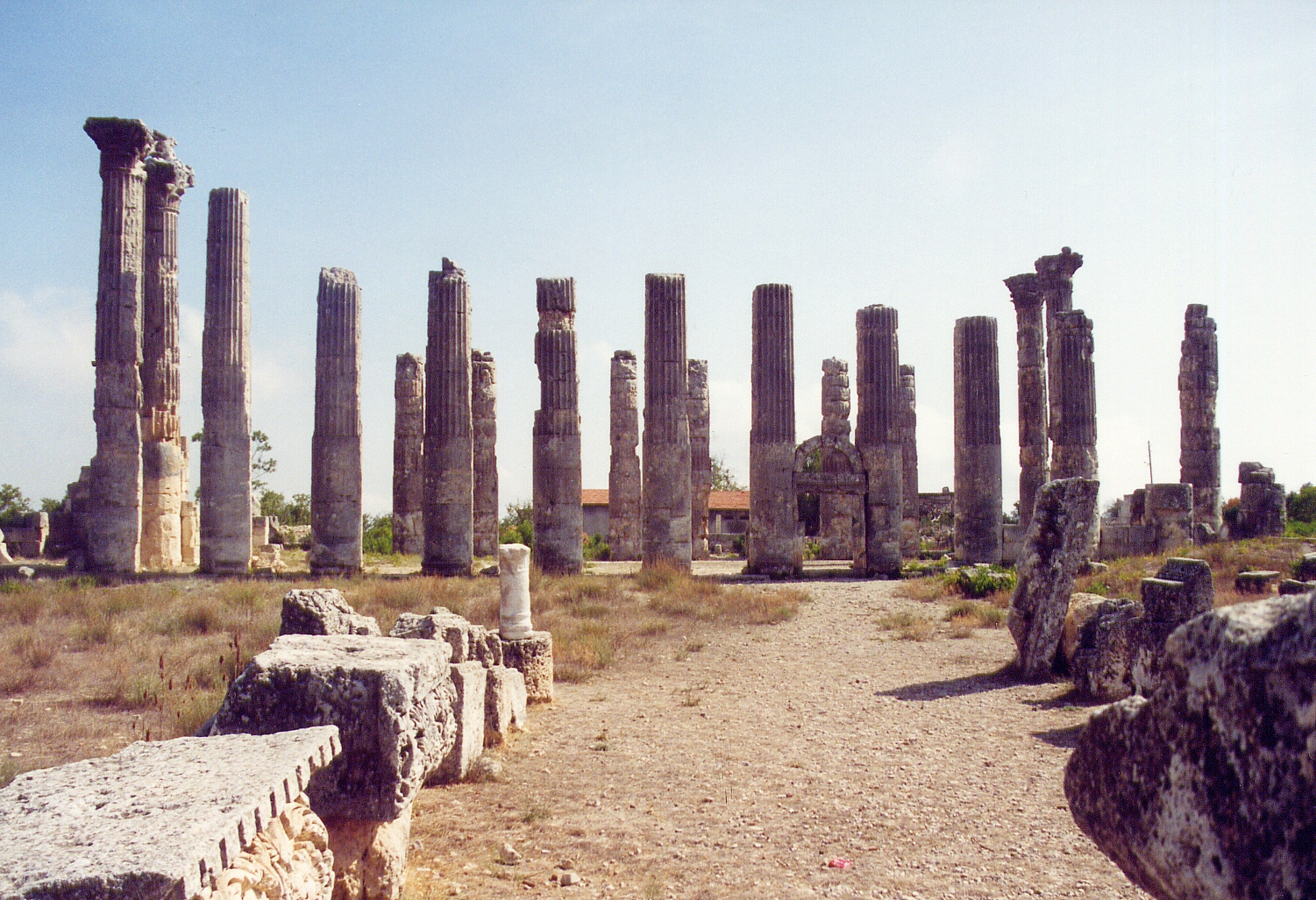 Zeus-Olbios-Tempel, Diokaisareia/Uzuncaburc Türkei